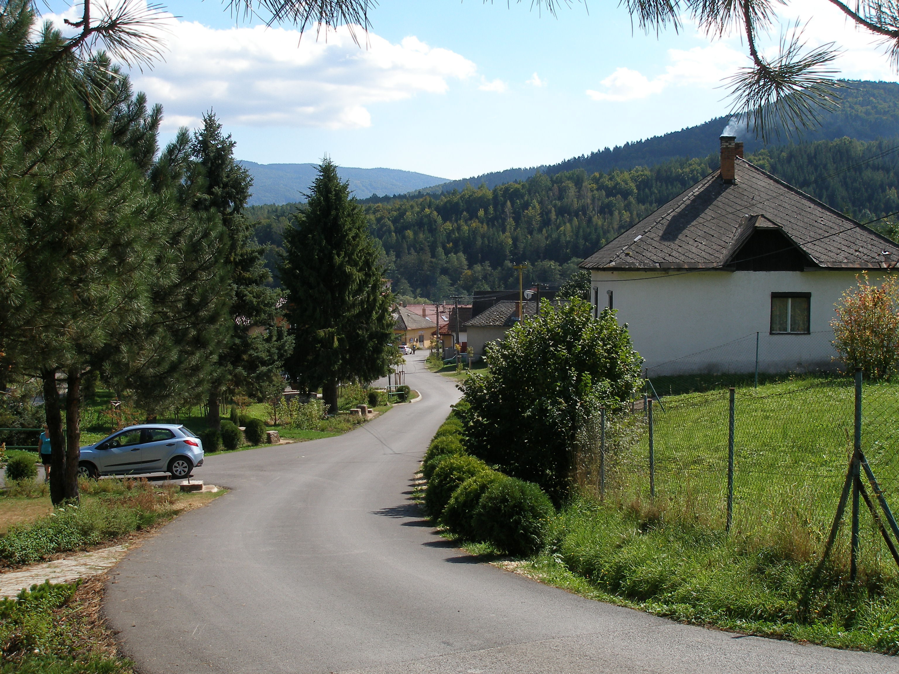 Spišská obec Helcmanovce..Okres Gelnica.